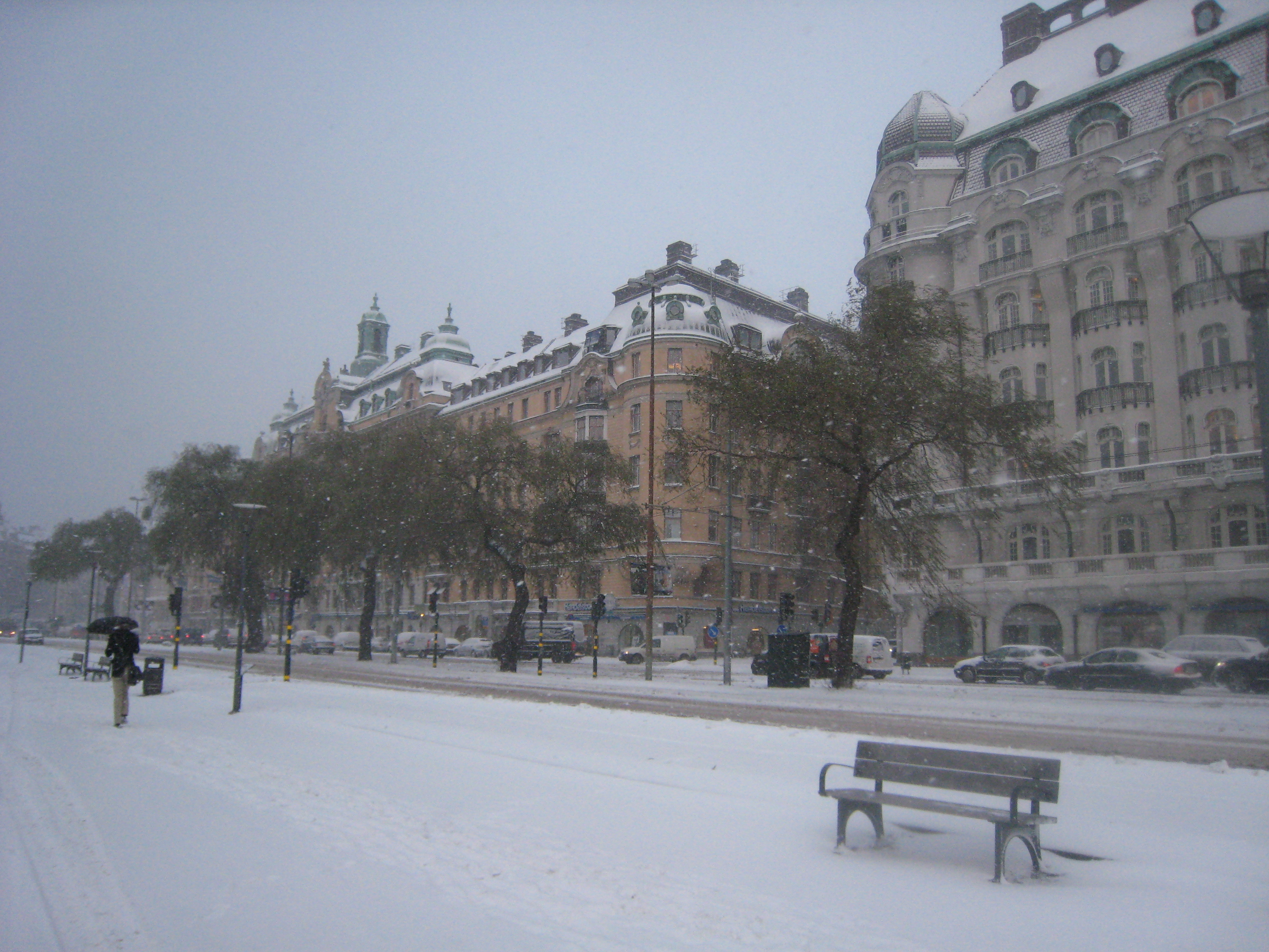 Strandvägen 1-7